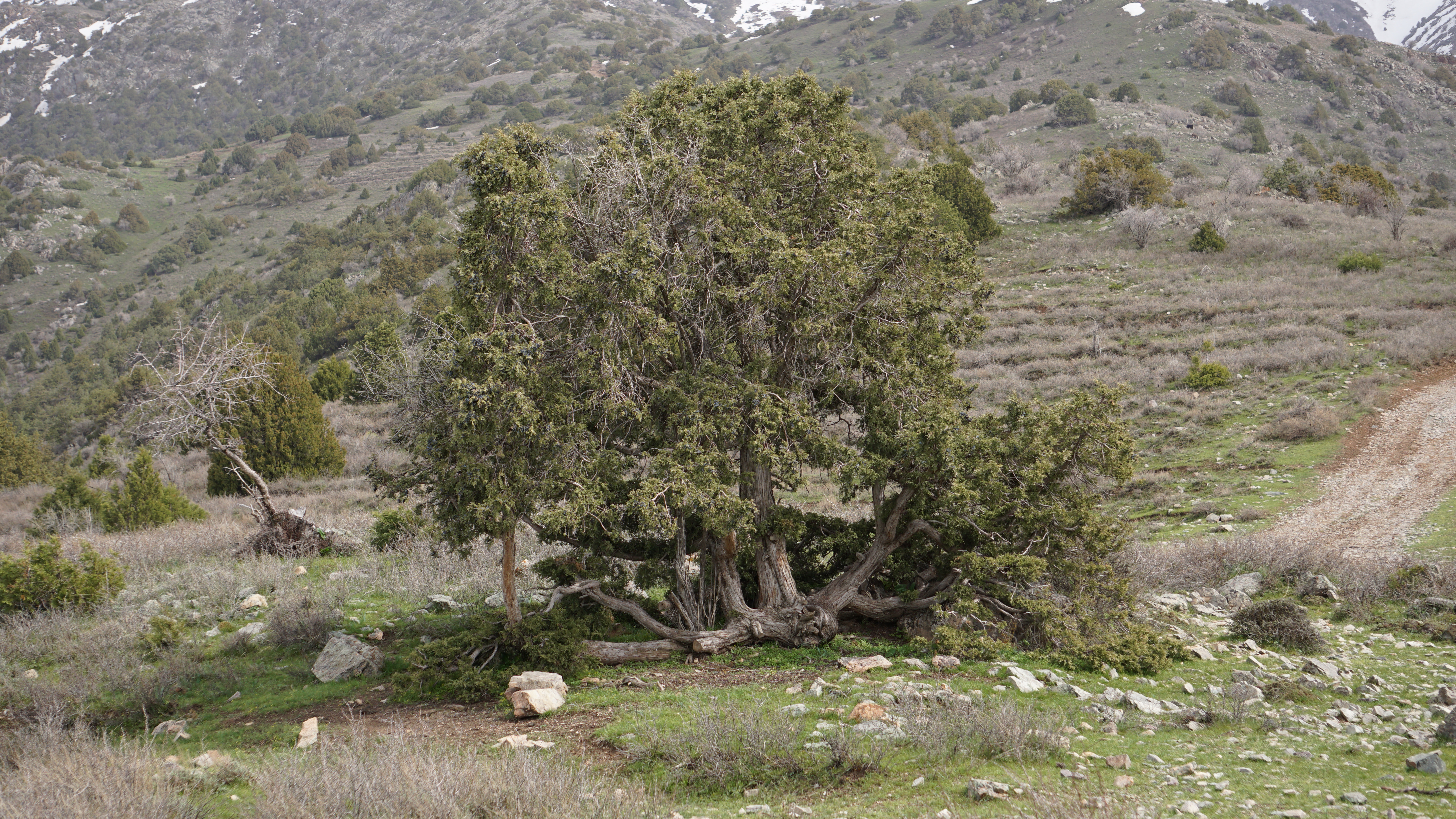 Арча